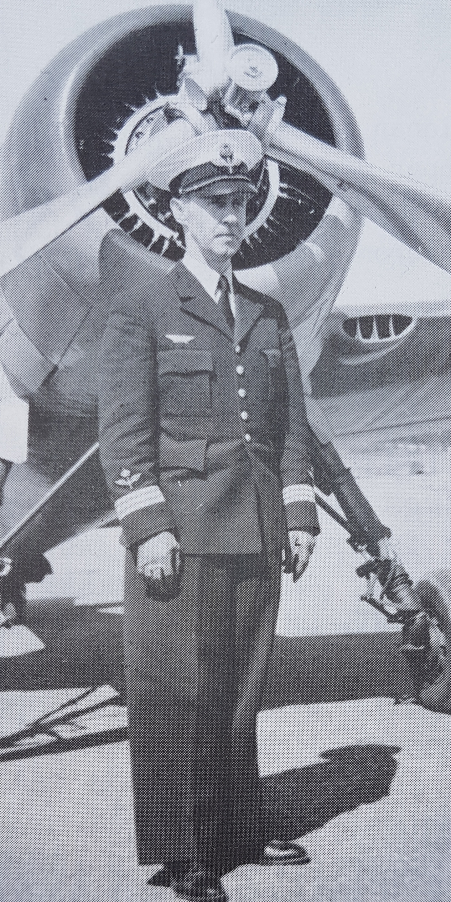 Bo Lundberg